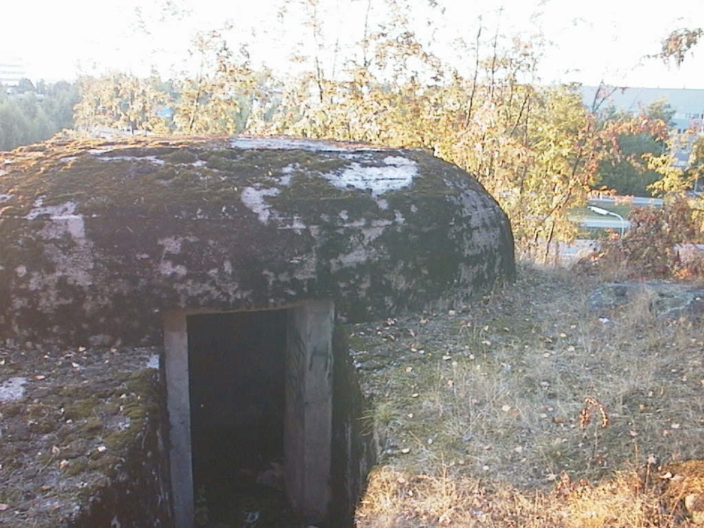 Kasematti Espoon Leppävaarassa Kehä I:n ja Tarvontien risteyksessä